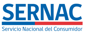 Logo institucional usado a partir de 2017 por el SERNAC